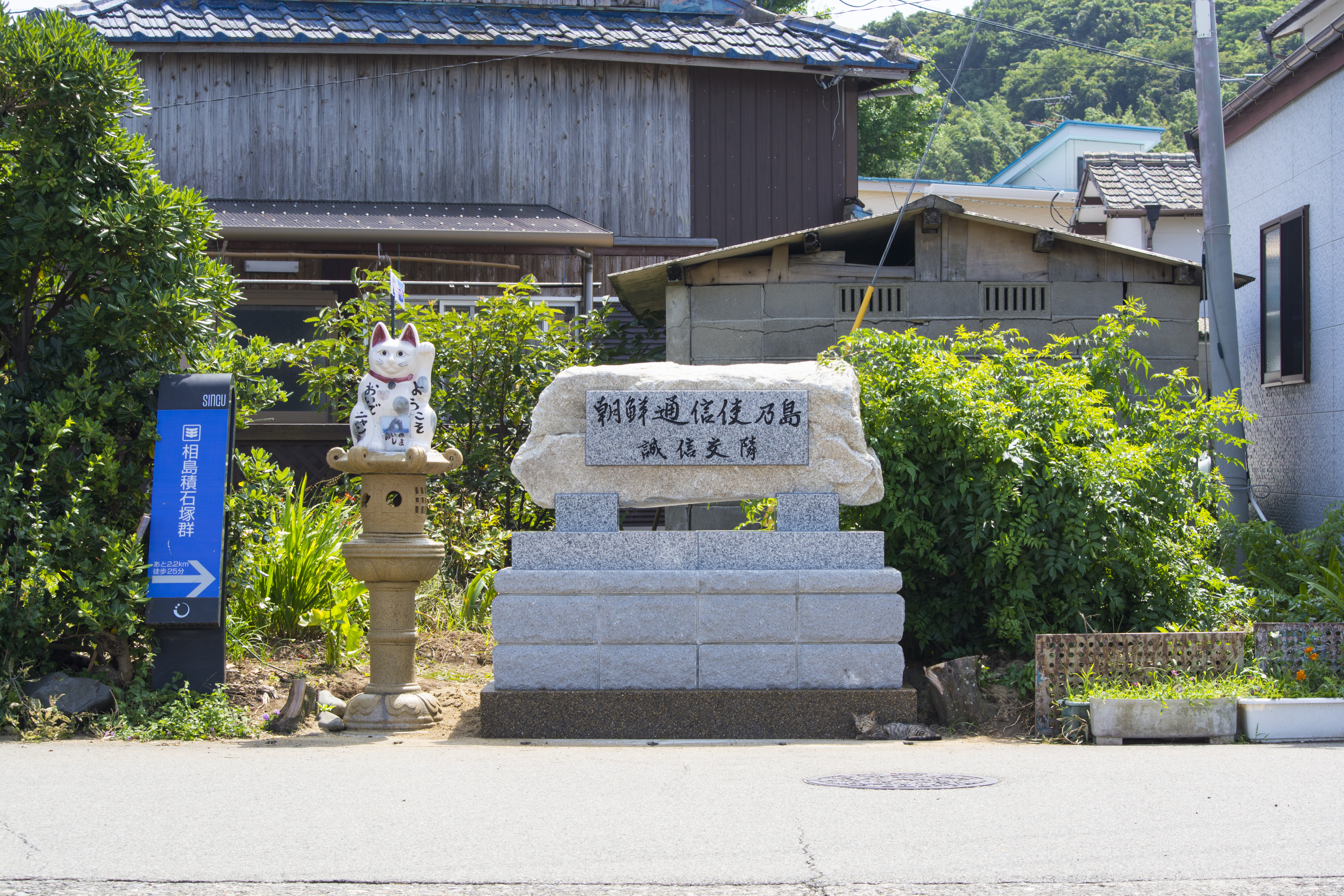 相島は、猫の島や朝鮮通信使の島として有名であり、最近新しいモニュメントが渡船待合所付近に作られた。